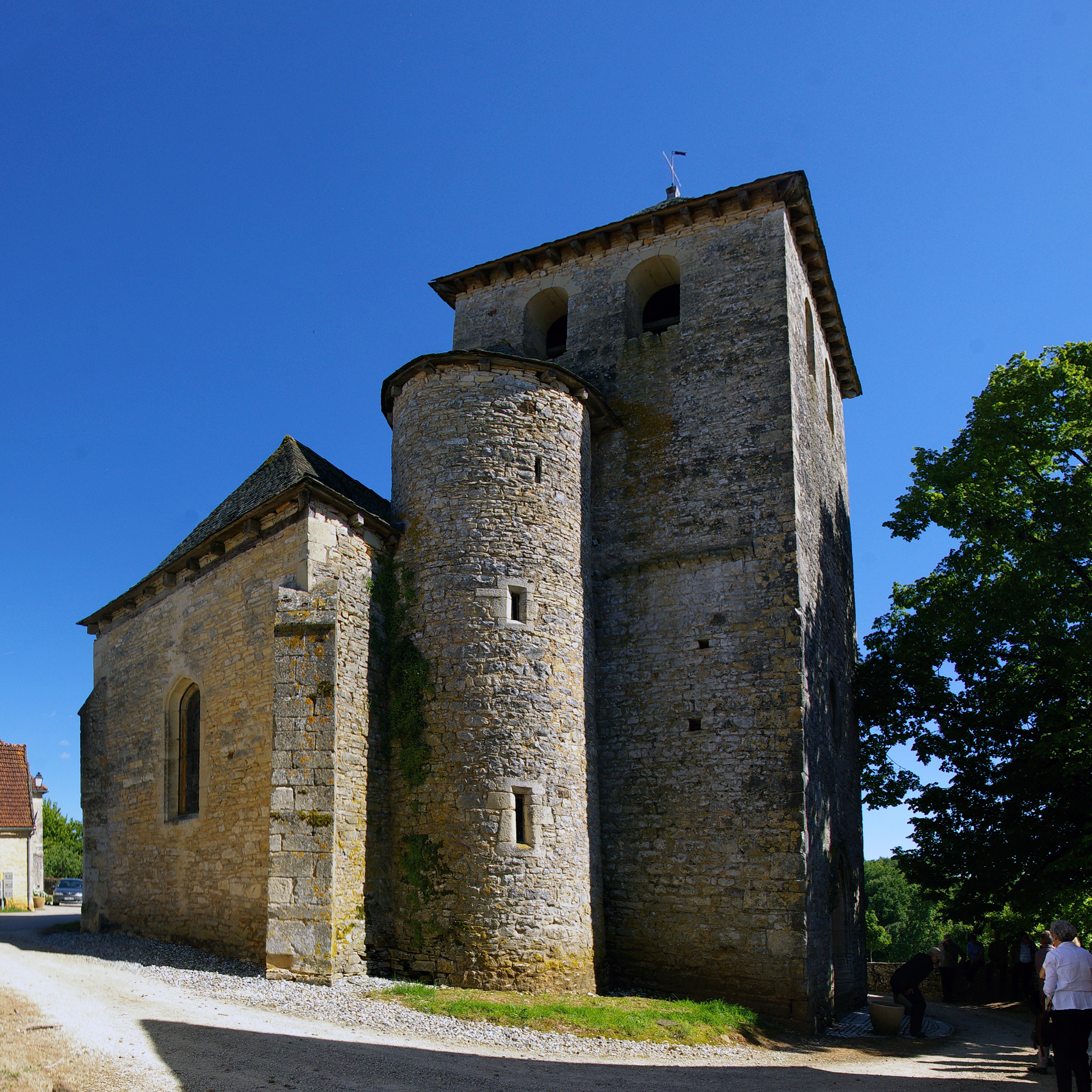 Église Saint-Pierre de Rampoux